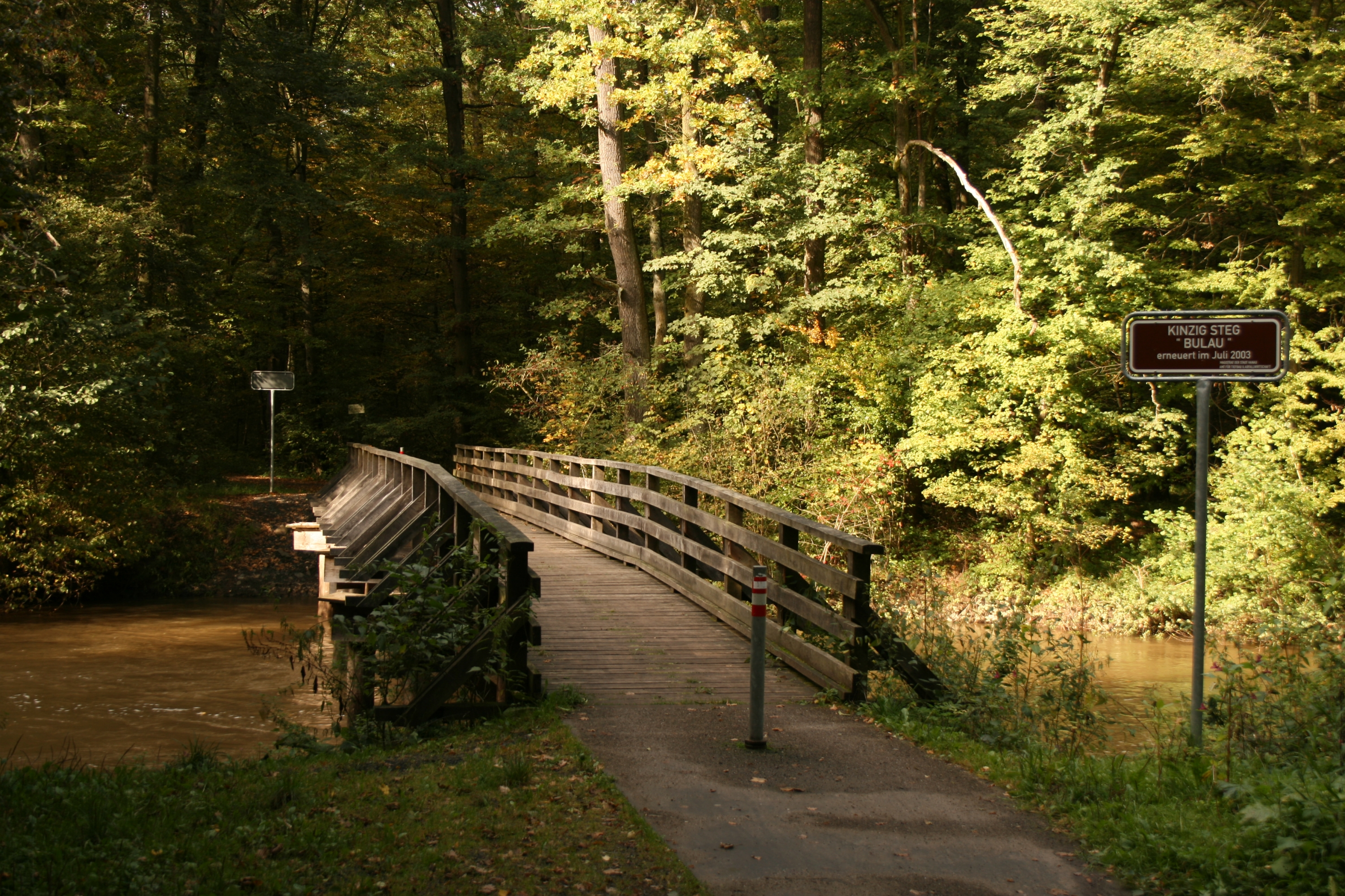 Kinzig-Steg in der Bulau, Hanau, Hessen; Bereich im FFH-Gebiet „Erlensee bei Erlensee und Bulau bei Hanau“